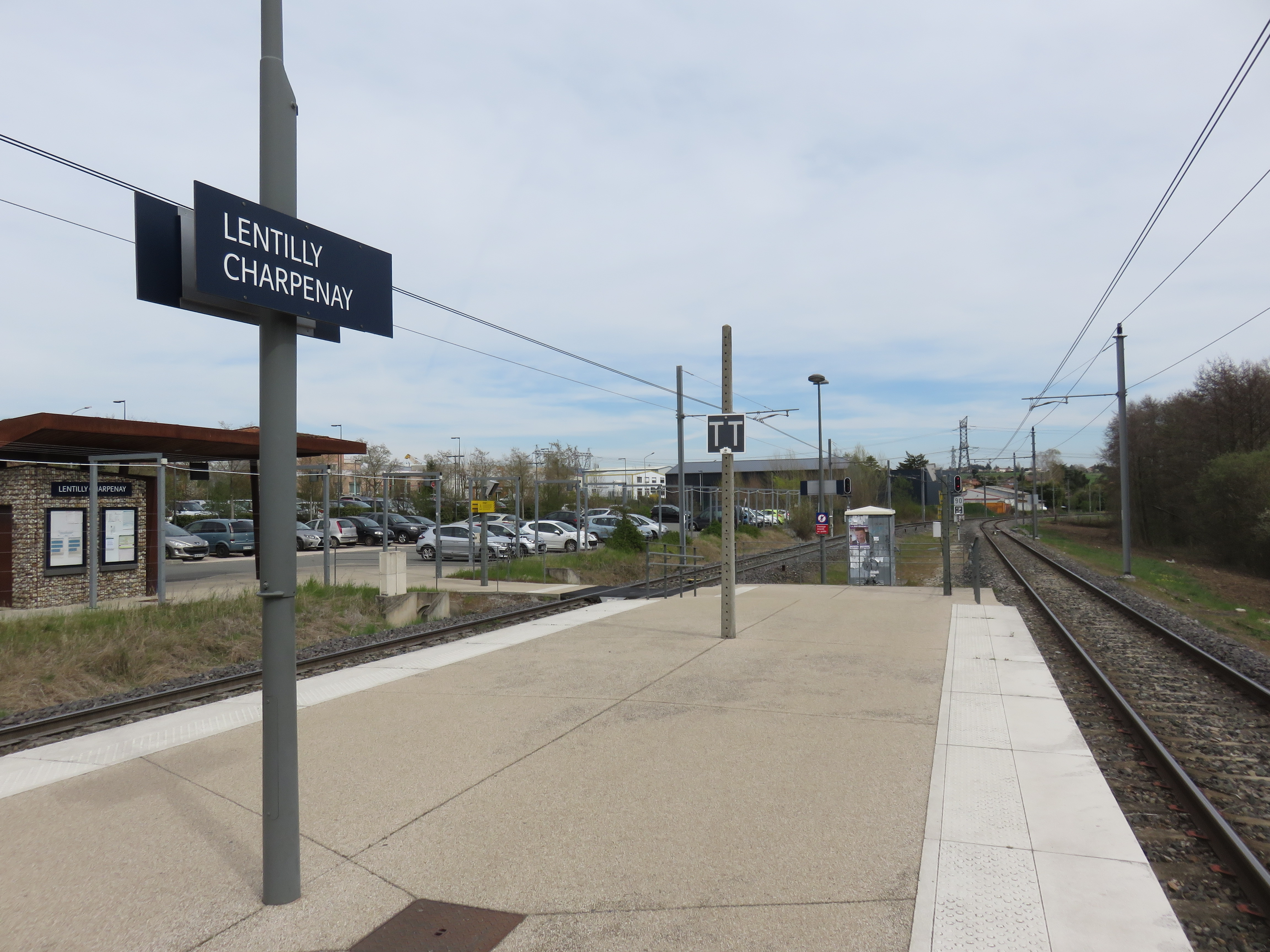 Vue de la gare de Lentilly-Charpenay à Lentilly (Rhône, France).